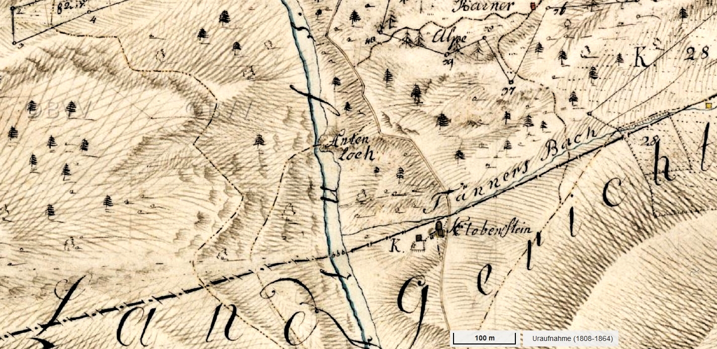 Engstelle "Anten Loch" der Entenlochklamm zwischen Kössen und Schleching, Ausschnitt der Uraufnahme (1808-1864)